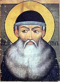 Максим Грек, икона